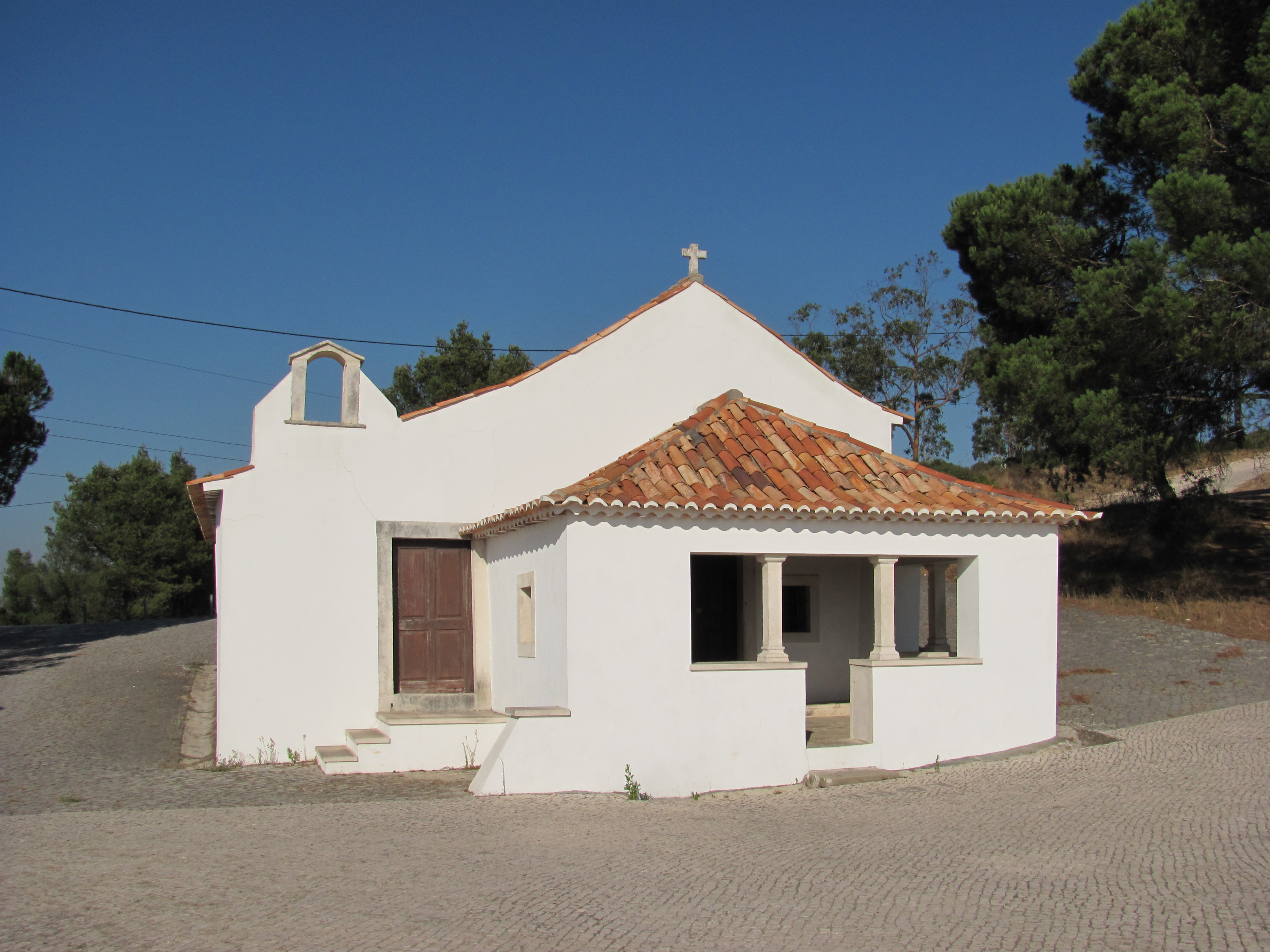 Photographie de la chapelle de la Dame du Mont (capela da Senhora do Monte), Cortes, Leiria, Portugal.